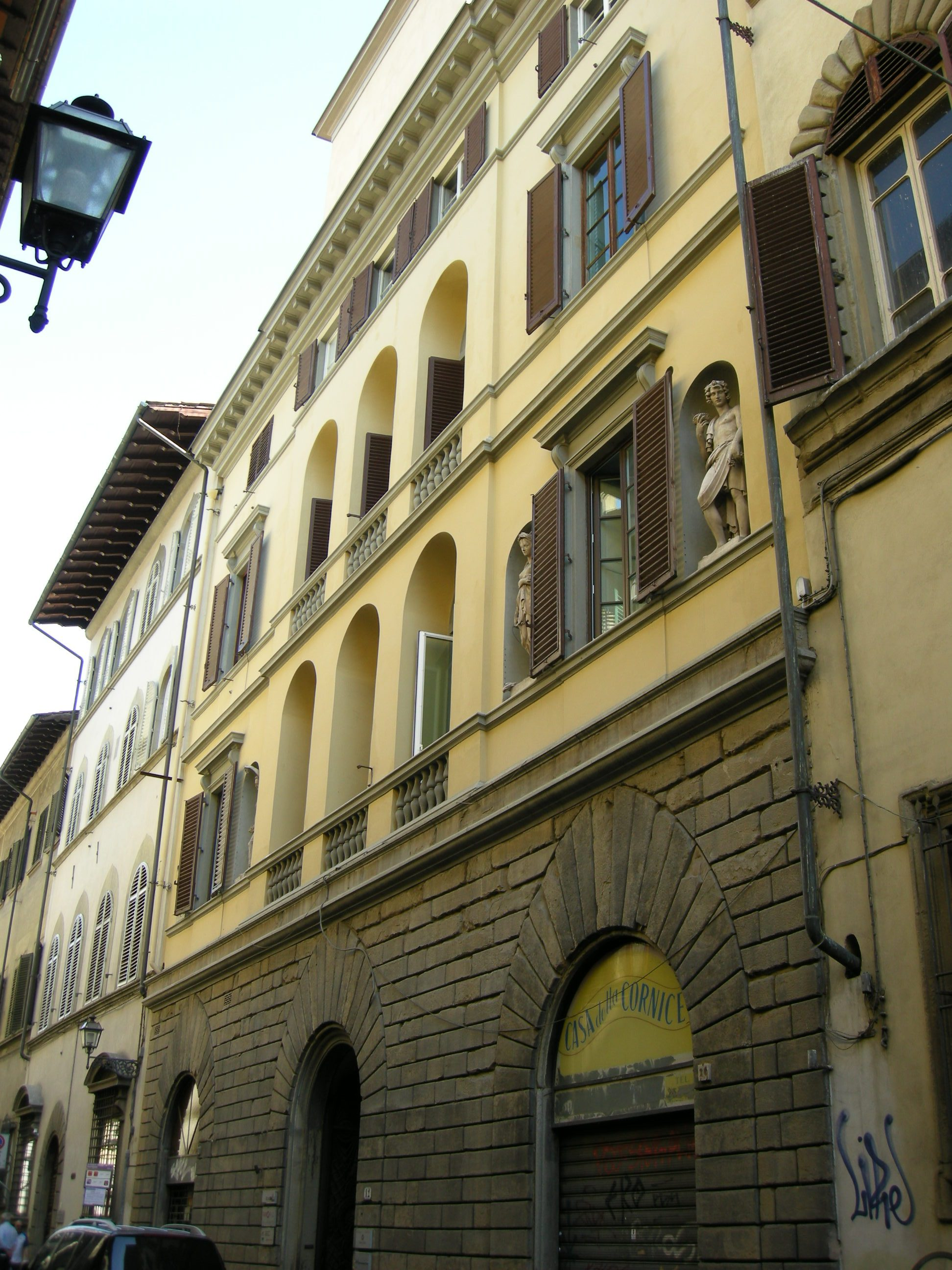 Palazzo galletti